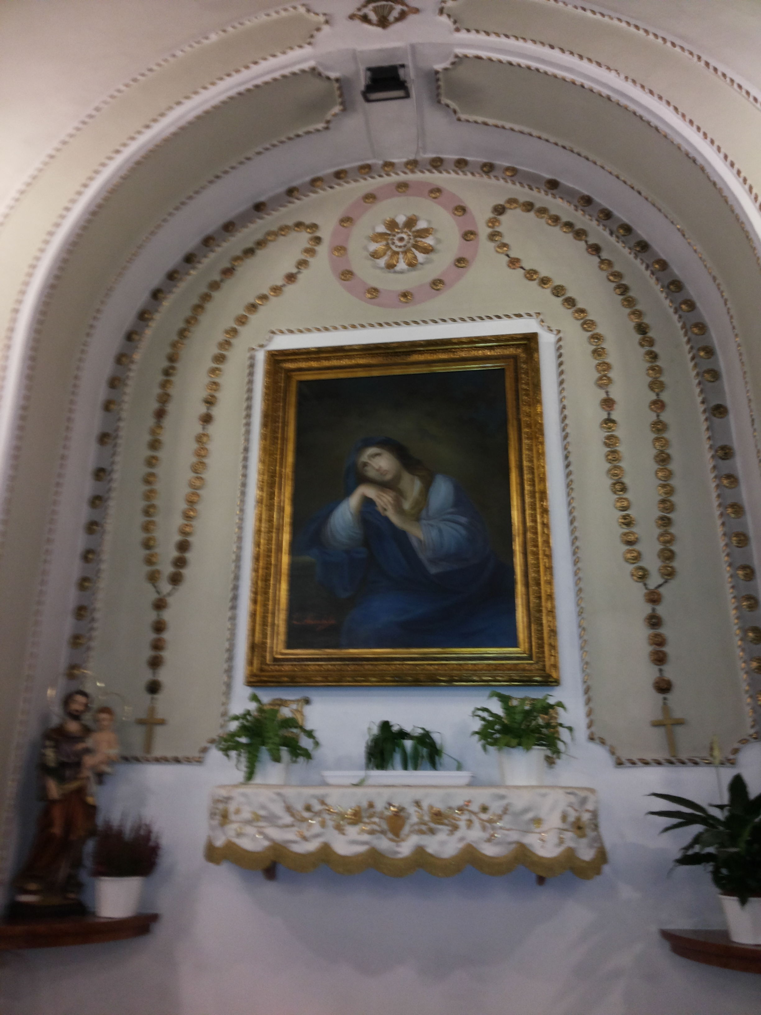 Dipinto della Madonna della confusione nella chiesa di Sant'Anna (Alcamo)